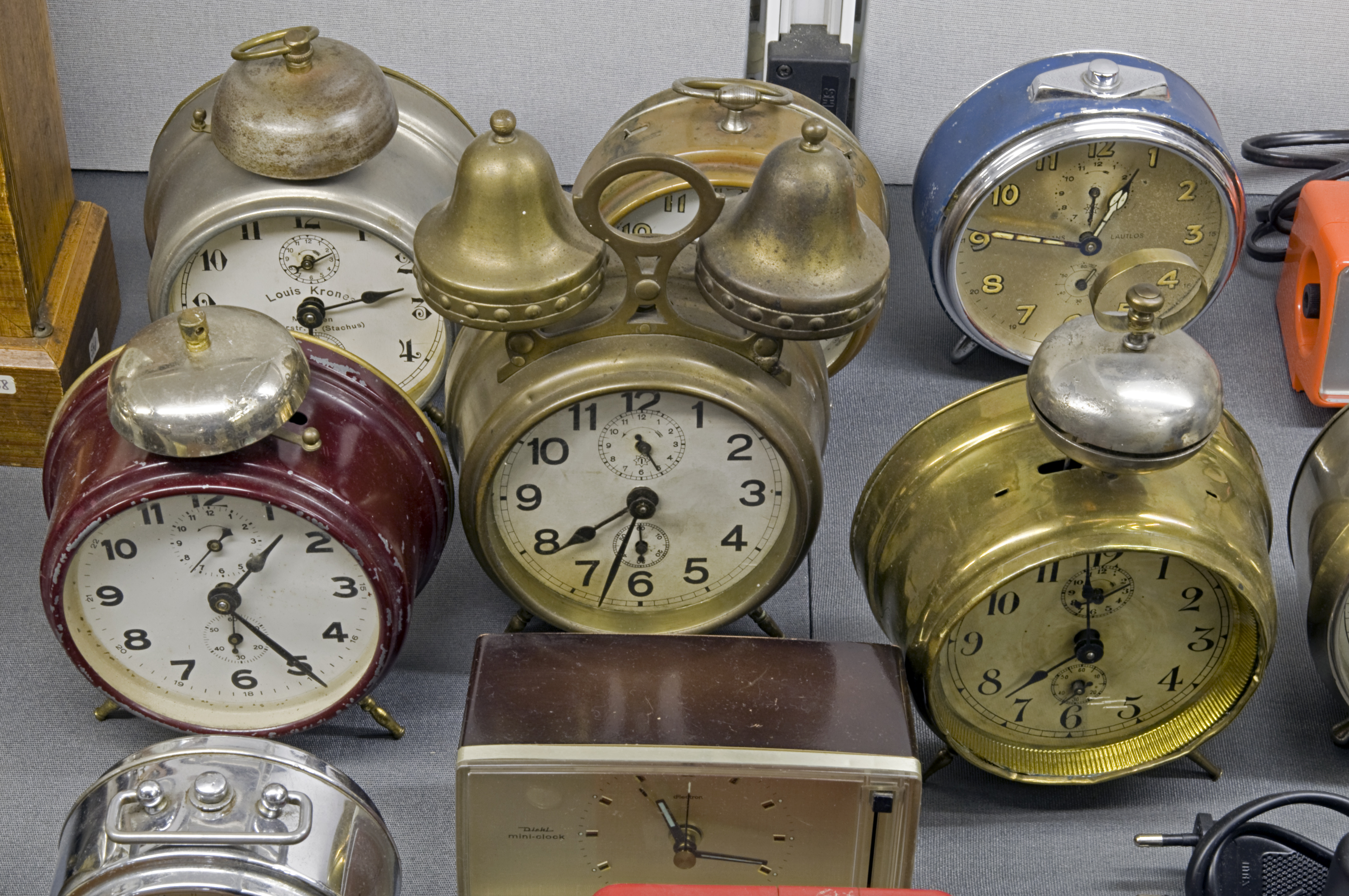 Museum für Uhren, Schmuck und Kunst Frankfurt am Main Glockenwecker